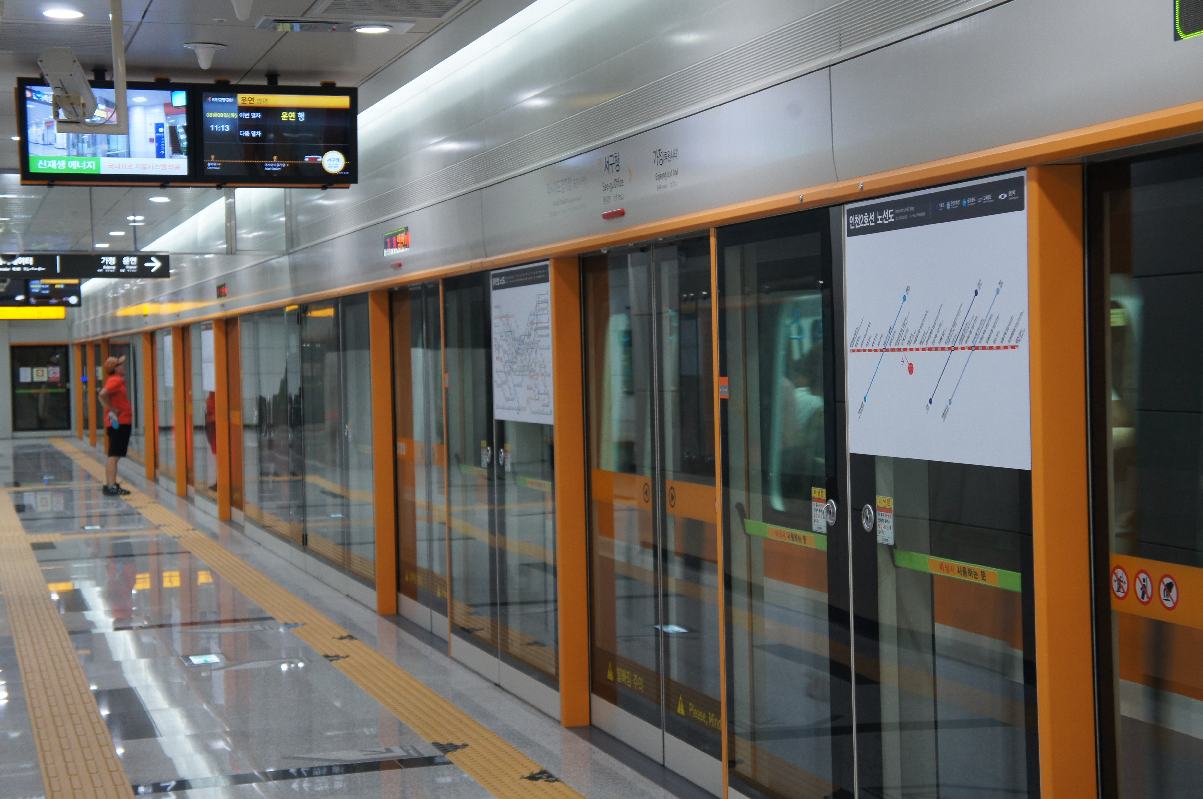 서구청역 승강장